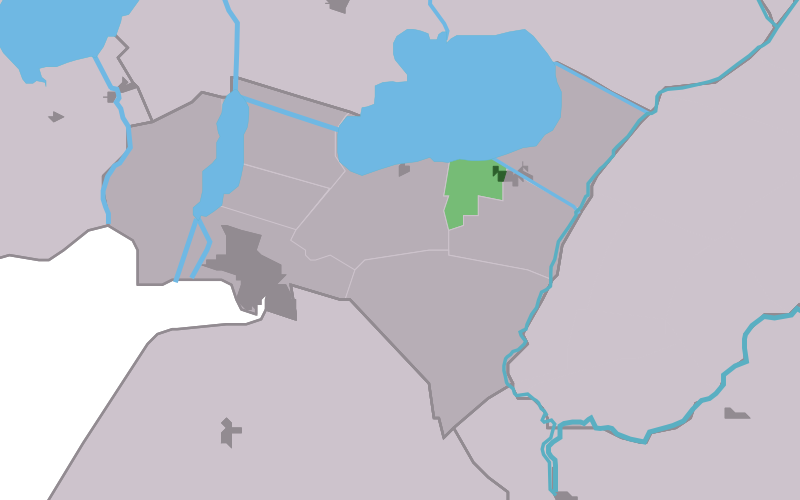 Kaartsje fan himrik fan Ychten